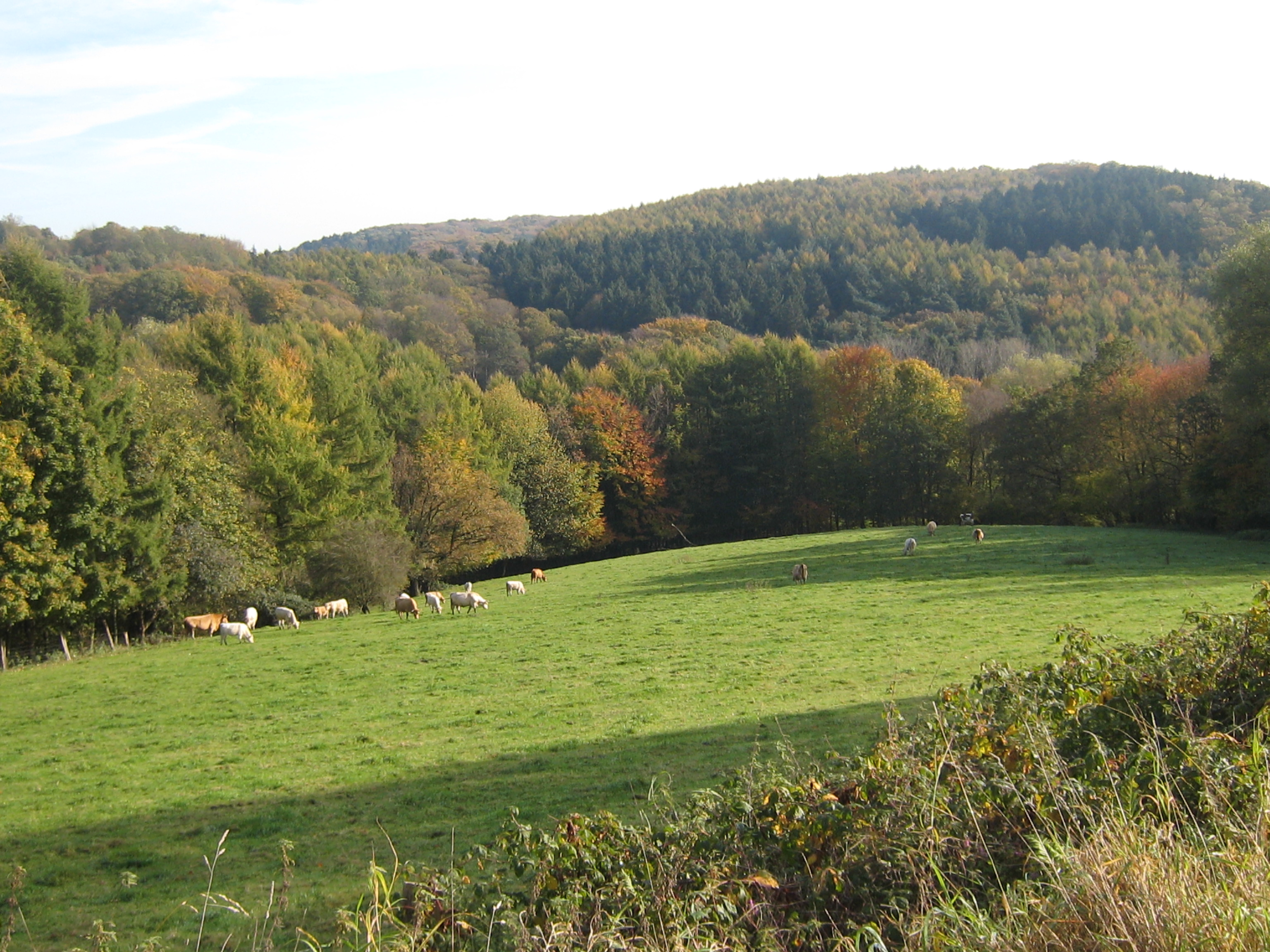 Dortmund-Syburg: Blick von der Syburger Dorfstraße (Nordosthang des Sybergs) zum Asenberg (Stadtgebiet Dortmund) und zum Ebberg (Gipfel links im Hintergrund, Stadtgebiet Schwerte)